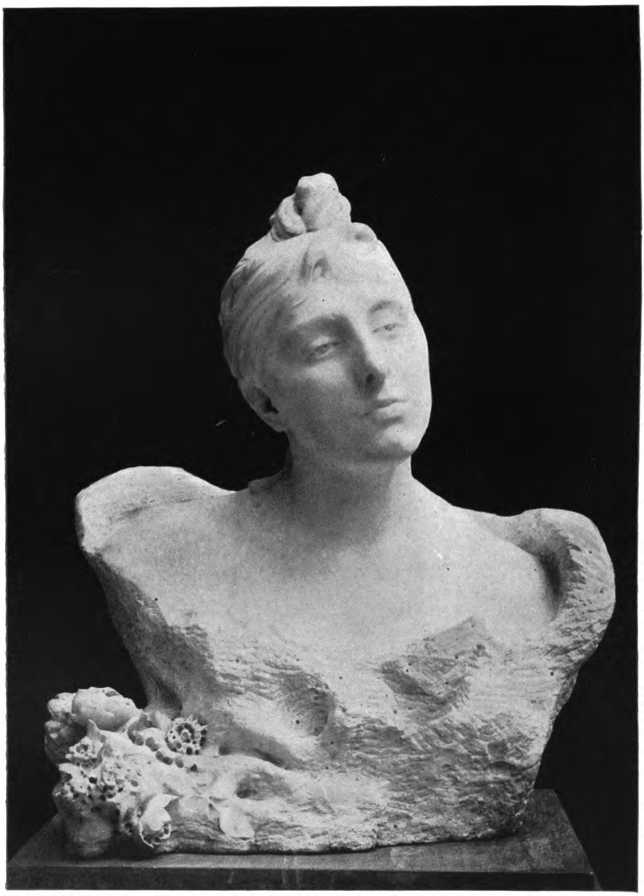 Buste de madame Vicuna, par Auguste Rodin. Paru dans le livre L'Art, entretiens réunis par Paul Gsell, Grasset, 1911. page 249